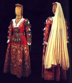 Costume tradizionale di Piana degli Albanesi indossato dalle donne arbëreshe per il matrimonio (martesia) secondo il rito greco-bizantino.